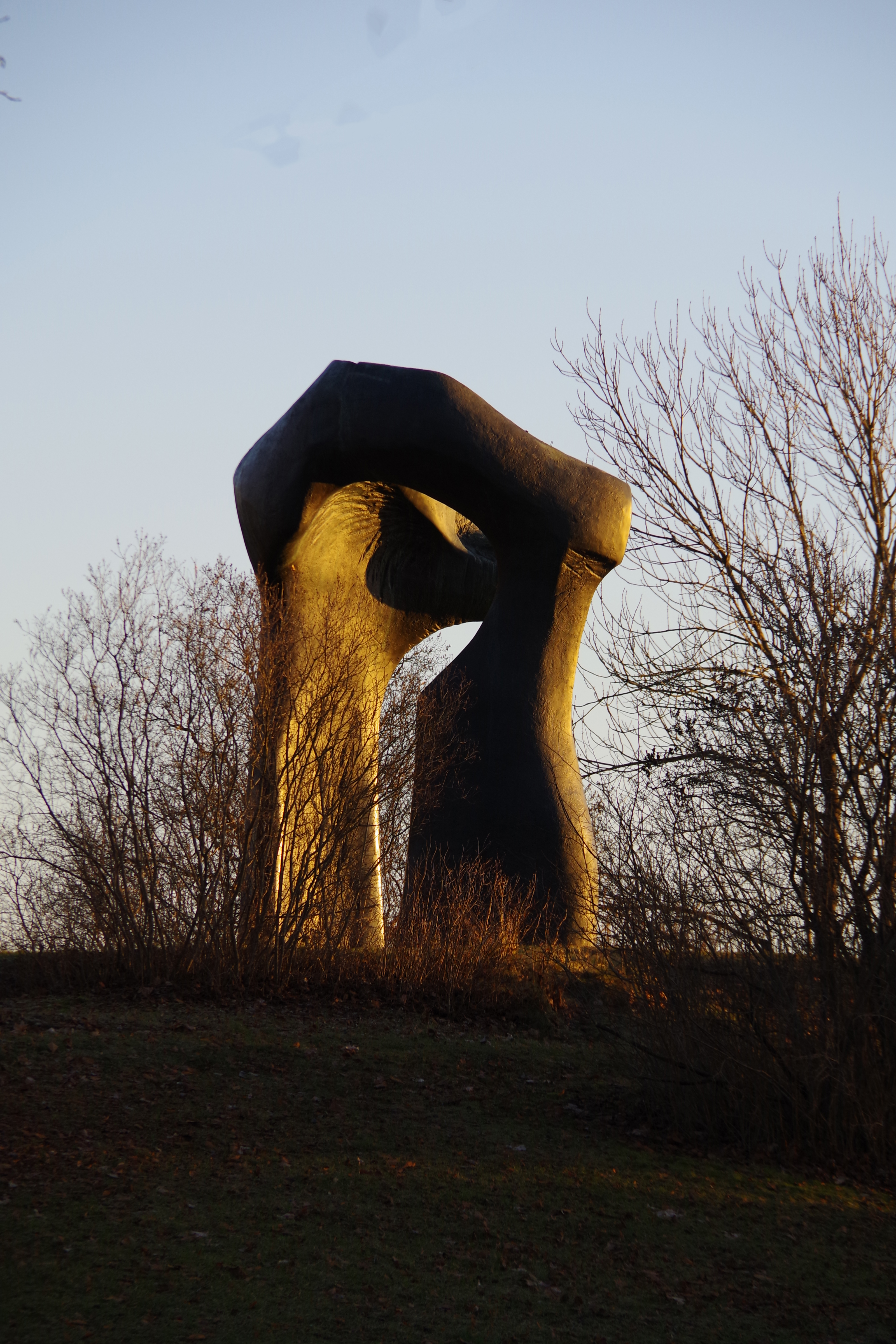 Henry Moores La Arch 1963-1965 kopi oppsatt på Huk i Oslo